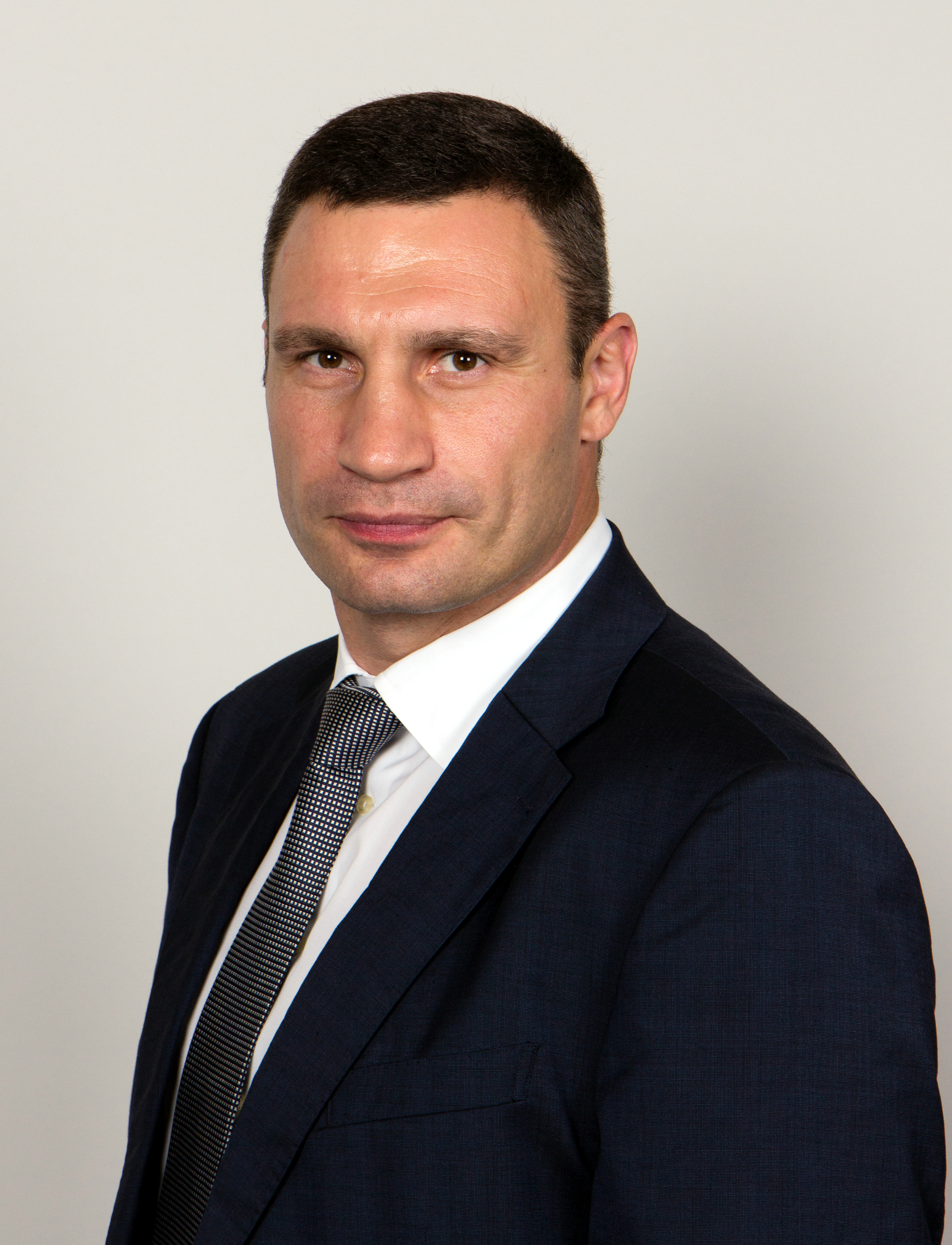 Vitali Klitschko. Wikipedia-Bundestagsprojekt 2014 8–12 September 2014 in BerlinThis file was taken during the project “Wiki loves parliaments/Bundestag 2014” (German). Organisation: Martin Rulsch, Olaf KosinskyDesign: Martin KraftPhotography: Foto-AG Gymnasium Melle (Jan-Kristof Blömke, Lukas Eismann, Moritz Kosinsky, Laura Lessing, Karsten Mosebach, Mascha Mosebach, Teresa Schreer, Noah Sewöster, Niklas Tschöpe), Olaf Kosinsky, Martin Kraft, Harald Krichel, Steffen Prößdorf, Ralf Roletschek, Martin Rulsch, Gerd Seidel, Sven TeschkeVideo: Marc Rudnick, Manuel SchneiderEditors: Marcus Cyron, Günter Fremuth, Martin Kraft, Robin Krahl, Harald Krichel, Martin Rulsch, WikiAnikaReception: DasMonstaaa, Leonie Rabea Große, Lutheraner, Nina Möllering, Martin Rulsch, WikiAnika, Foto-AG Gymnasium MelleCosmetics: Regina Bosak, Bettina Dieguez, Sandra Kobbe, Andrea Strehlke; Irada Abdullayeva, Vivien Abelmann, Olena Engelbrecht, Sarah Fabini, Nina Magnus, Jacqueline Schmidt, Leonie Taboada, Julia Willer Usage information If you need more information how to use this file, please send an email to . Personality rights warningAlthough this work is freely licensed or in the public domain, the person(s) shown may have rights that legally restrict certain re-uses unless those depicted consent to such uses. In these cases, a model release or other evidence of consent could protect you from infringement claims.